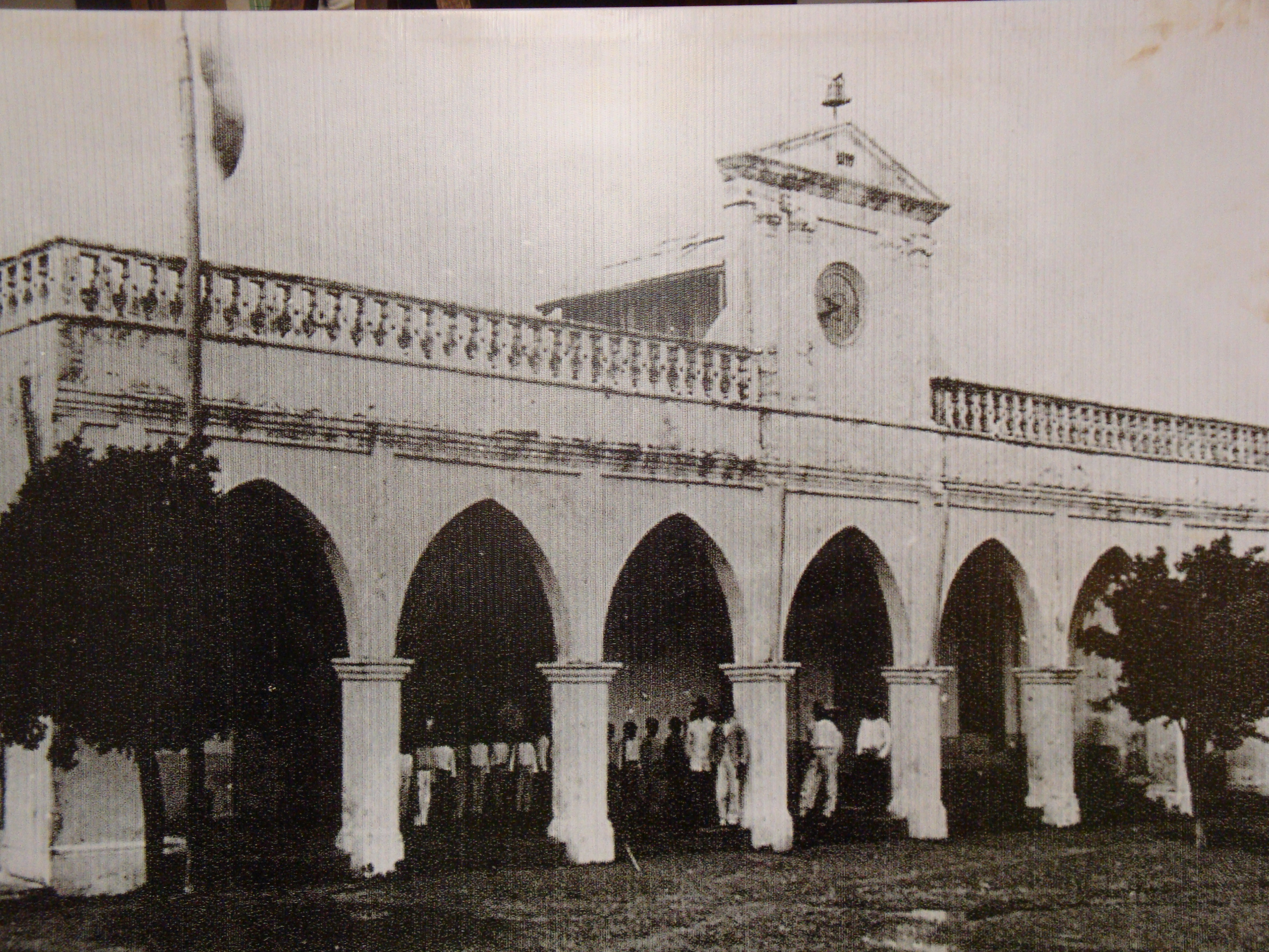 Fachada del antíguo Palacio Municipal de la ciudad de Huimanguillo, Tabasco, México.